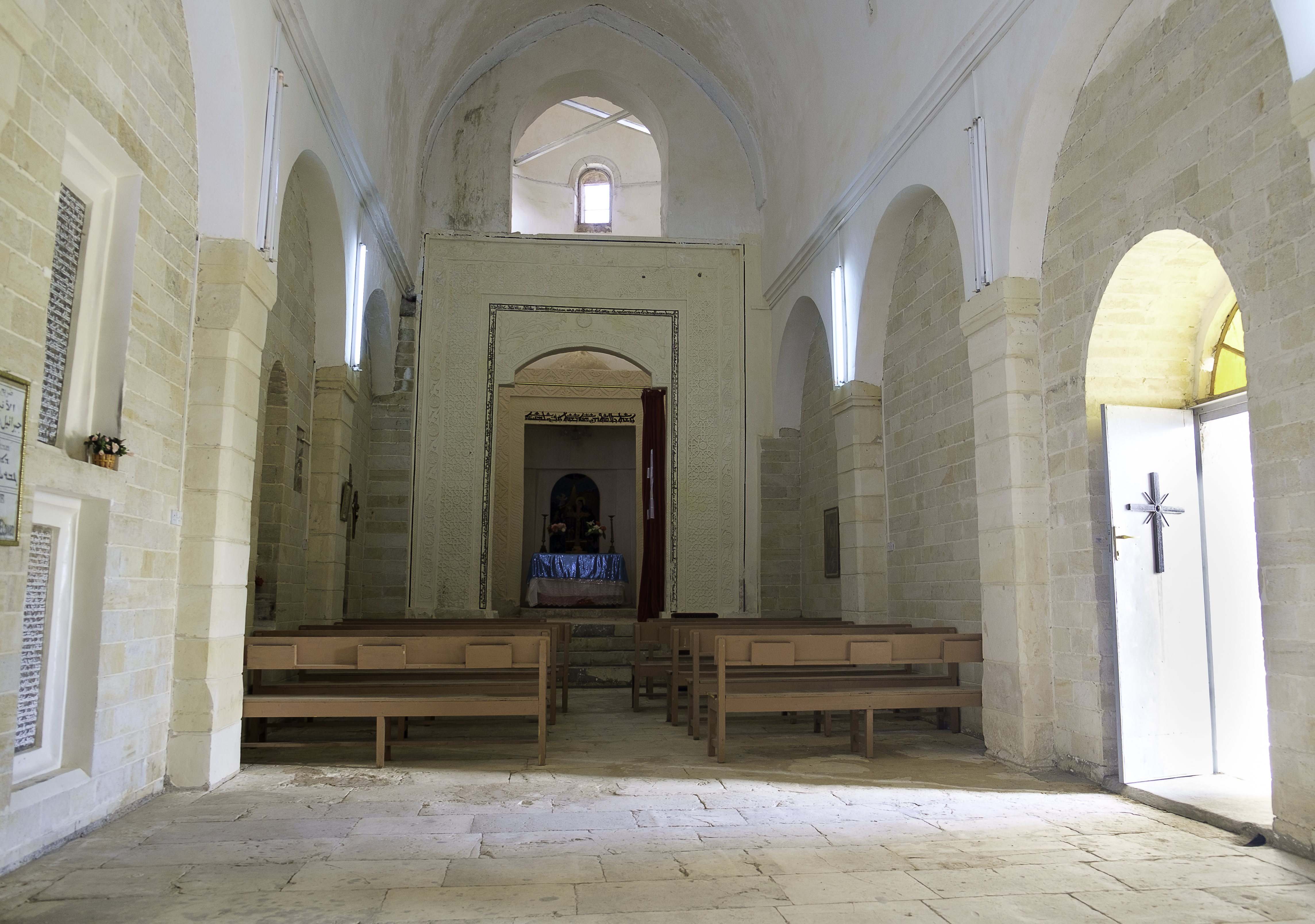 Church in Rabban Hormizd Monastery